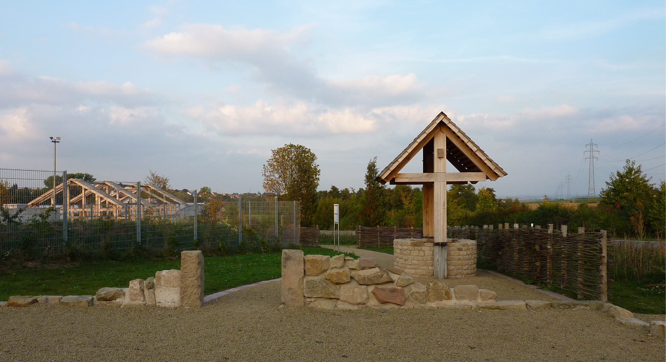 Freilichtmuseum in Güglingen, Reste eines römischen Hauses mit Brunnen und Weidenflechtzaun